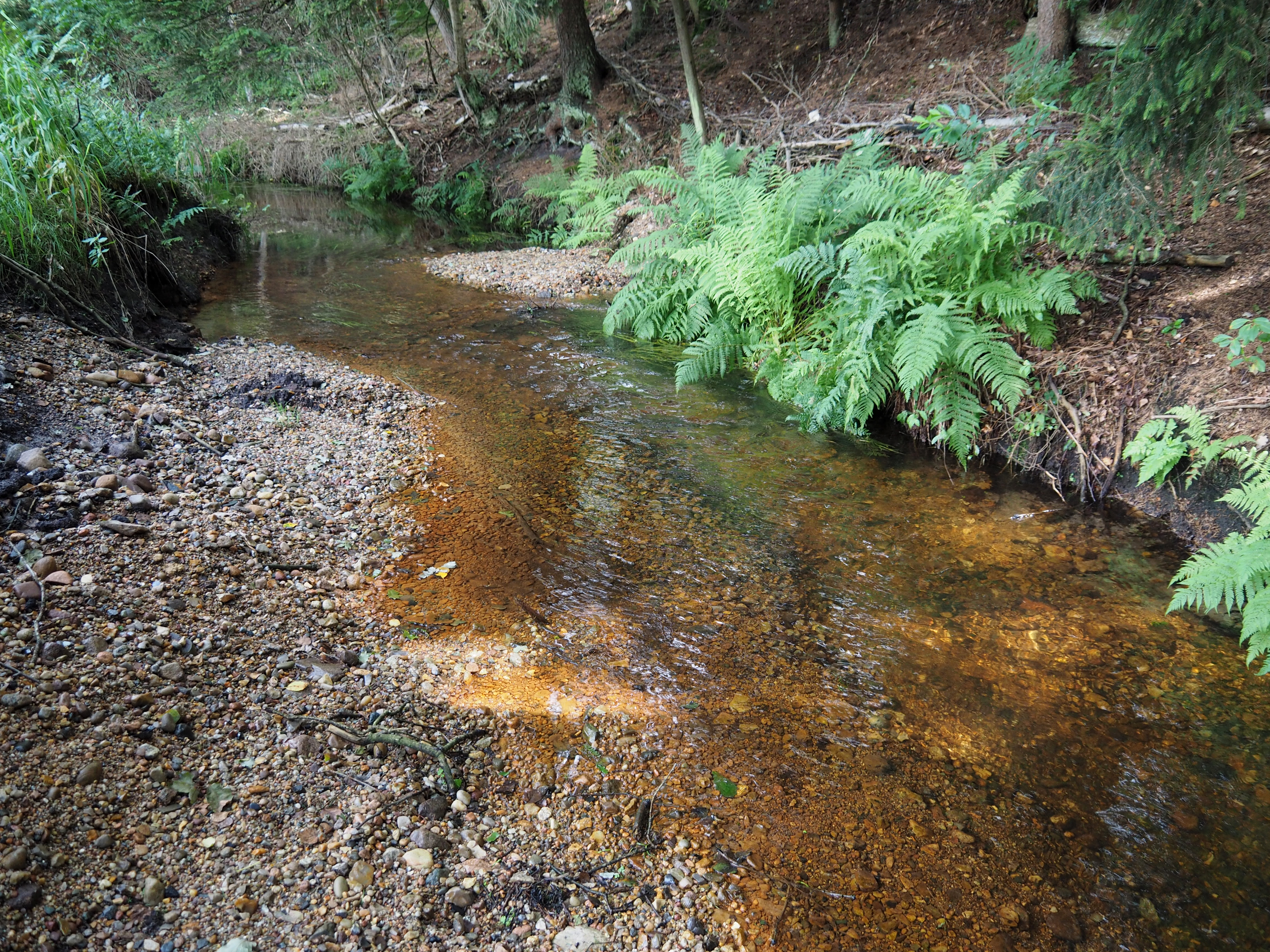 Bachbett des Weesener Baches nach der Einbringung von Kies